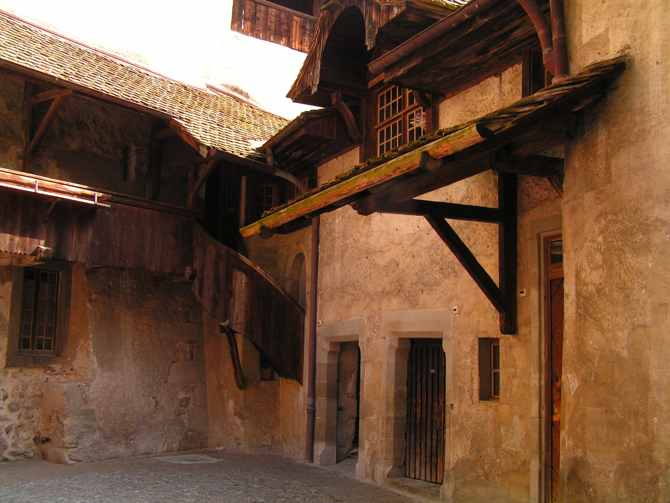 Hof im Schloss Chillon, Veytaux-Montreux, Schweiz